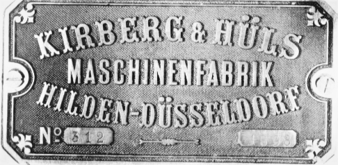 scan: Aus Metallverarbeitung in Hilden, Kapitel Kirberg & Hüls, Von der Drechslerwerkstatt zur Maschinenfabrik Hildener Museumshefte Band 4 1992